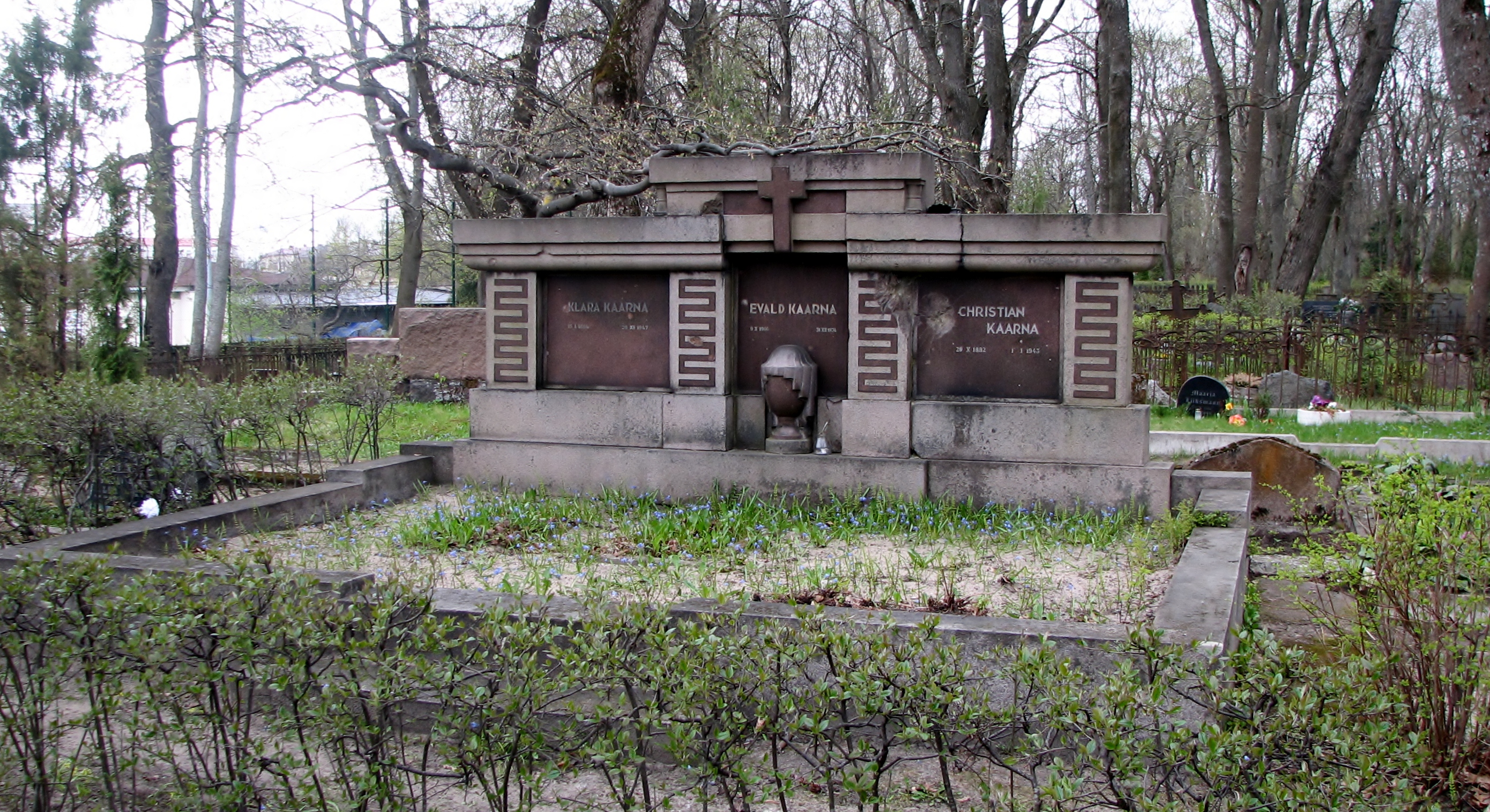 Christian Kaarna haud Siselinna kalmistul on perekond Kaarna rahulas parempoolseim